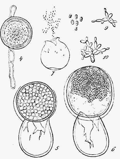 Fig. 4—7. Protomyces macrosporus. Fig.4 Mycel mit reifem „Ascus“; Fig. 5 u. 6 „Schläuche“ mit heraustretenden Sporenballen, 390fach vergr.; Fig.7 Sporenentleerung, 200fach vergr.